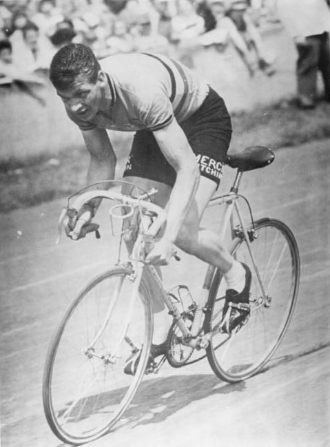 Vandenberghen Zentralbild Wendorf-Schmidt Zastr-Ho 13.5.1960 - XIII. Friedensfahrt 1960 - 12. Etappe am 13.5.1960 von Leipzig nach Halle 40 km Einzelzeitfahren und von Halle nach Magdeburg über 88 km. UBz: Der Sieger des Zeitfahrens Vandenberghen (Belgien).